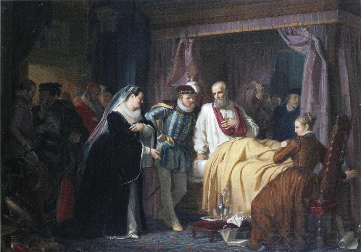 Wilhelm Volkhartin historiamaalaus. Maalauksen omisti aikoinaan Viipurin taidemuseo, nykyään Hämeenlinnan taidemuseo.